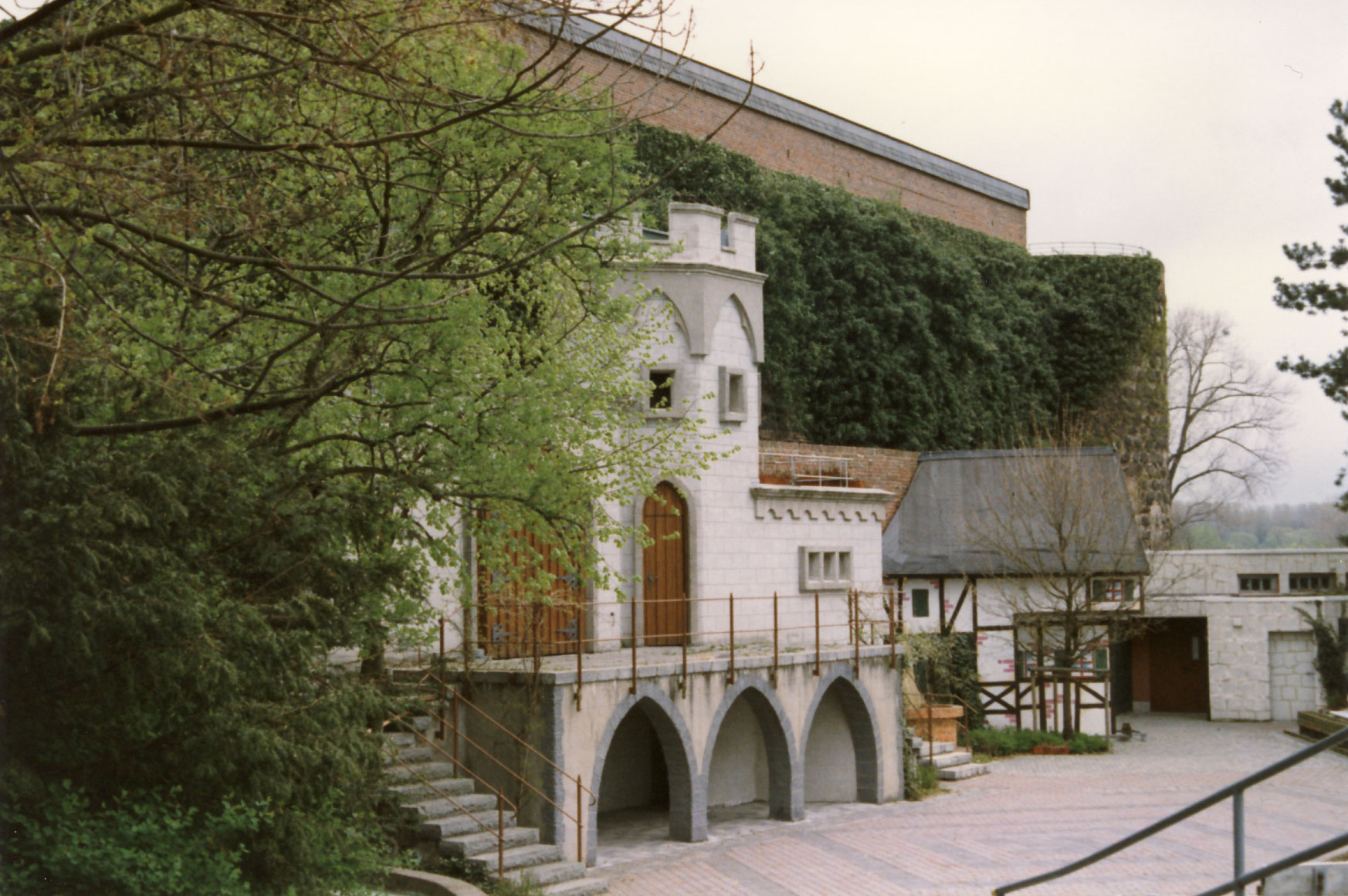 Freilichtbuehne in Zons